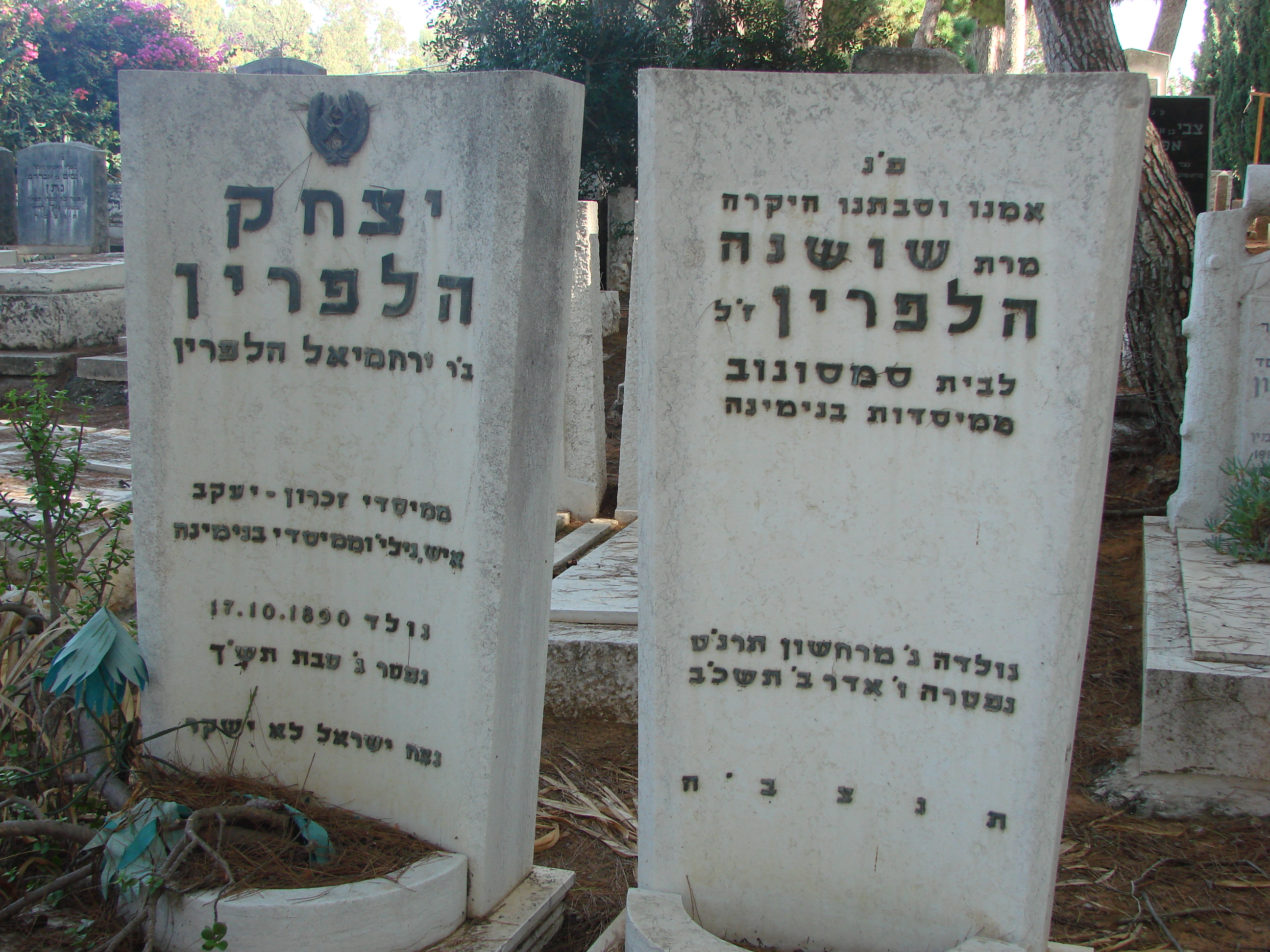 קברם של יצחק ושושנה הלפרין בבנימינה